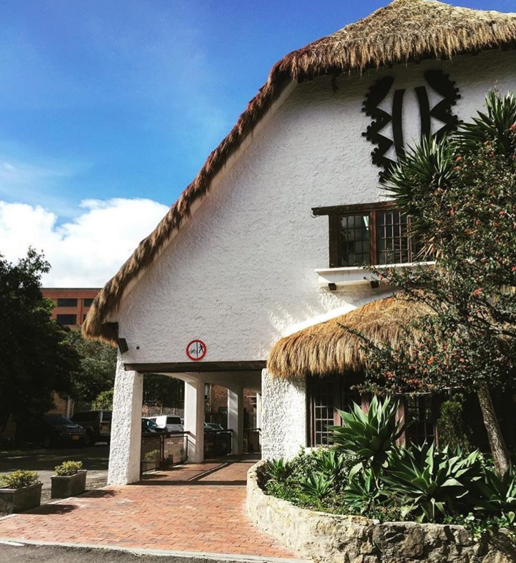 El Rancho UEB